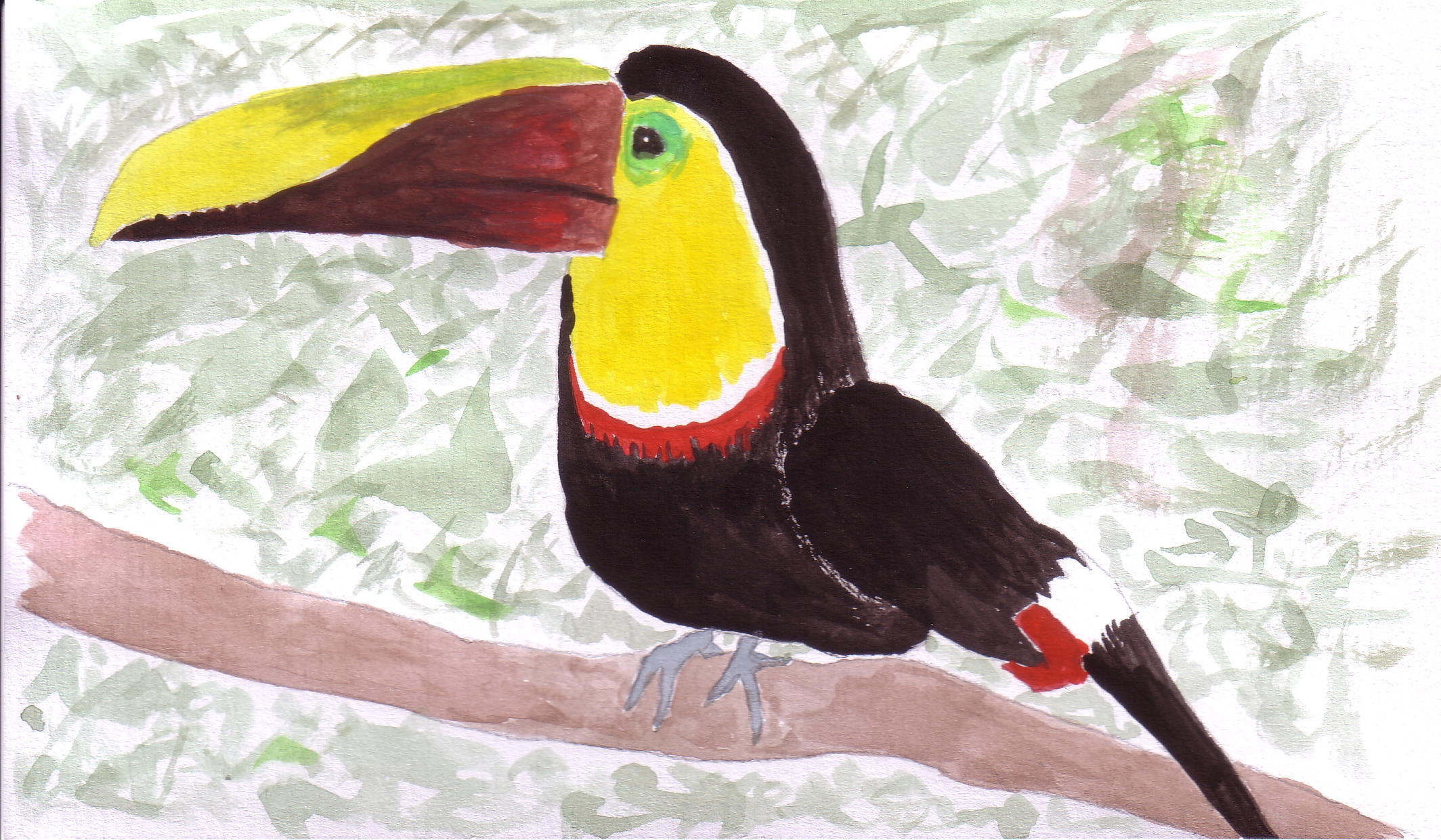 Nigrobeka tukano Ramphastos ambiguus